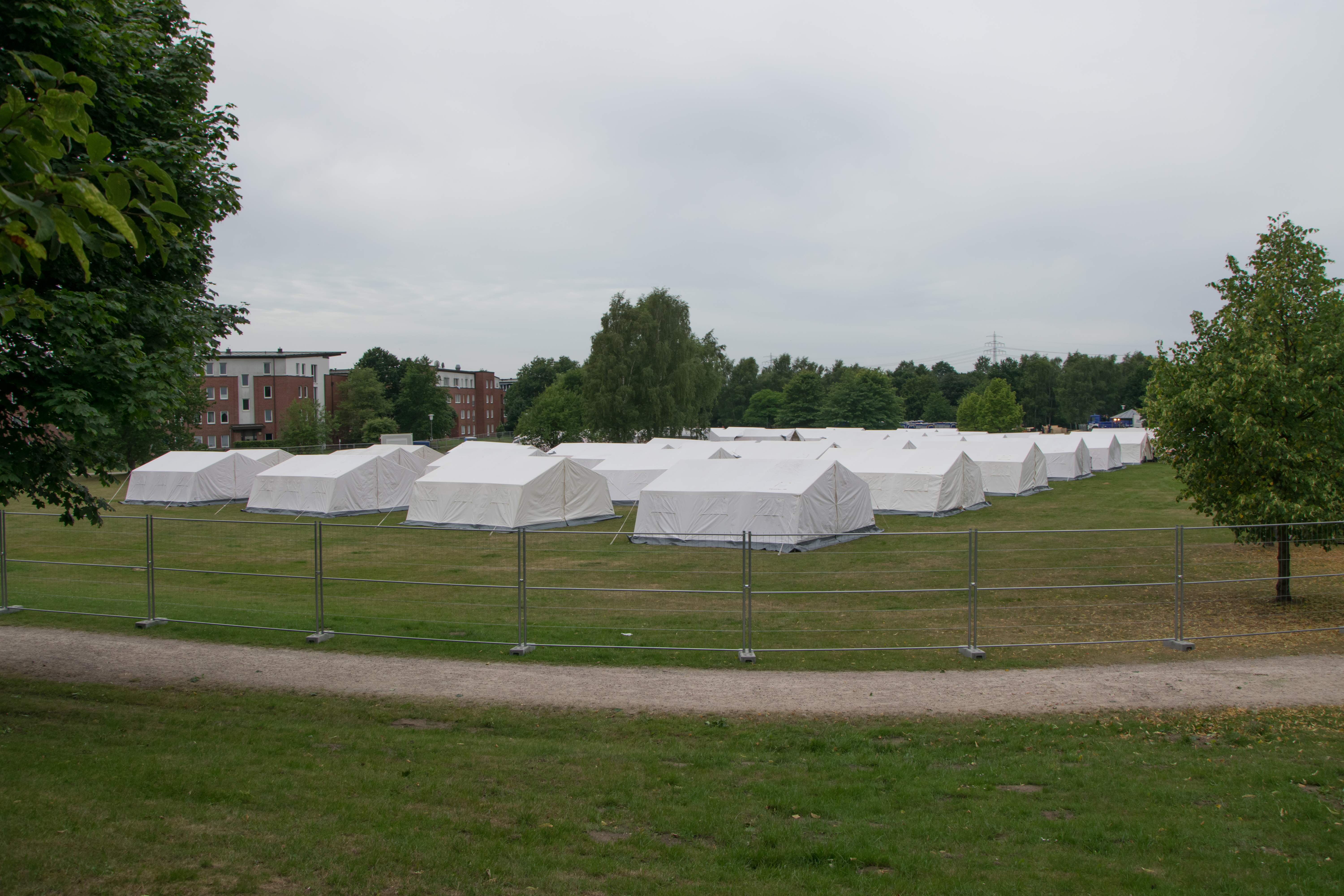 Erstaufnahmelager Jenfelder Moorpark